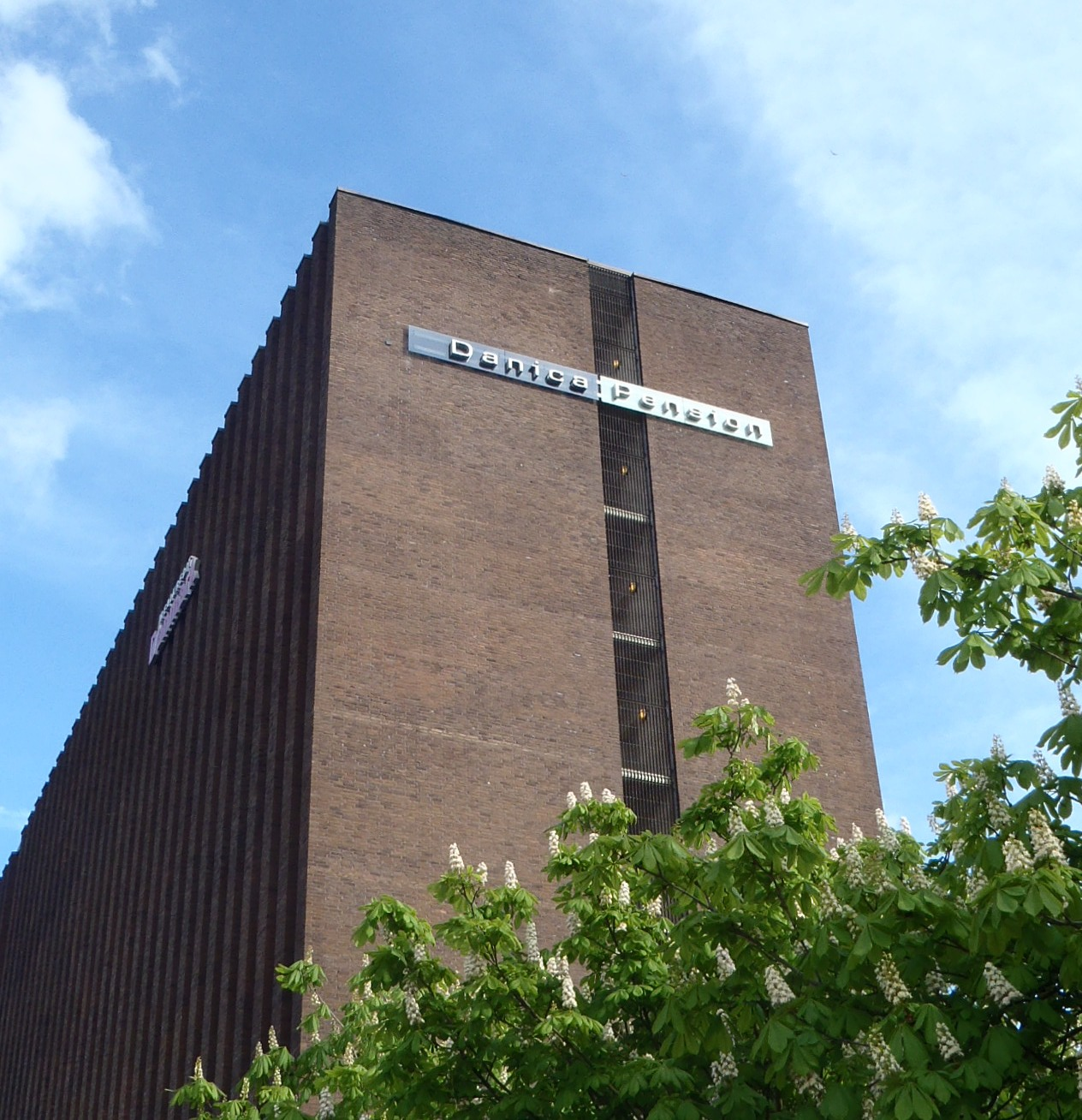 Bygning med Danica Pension i Kongens Lyngby